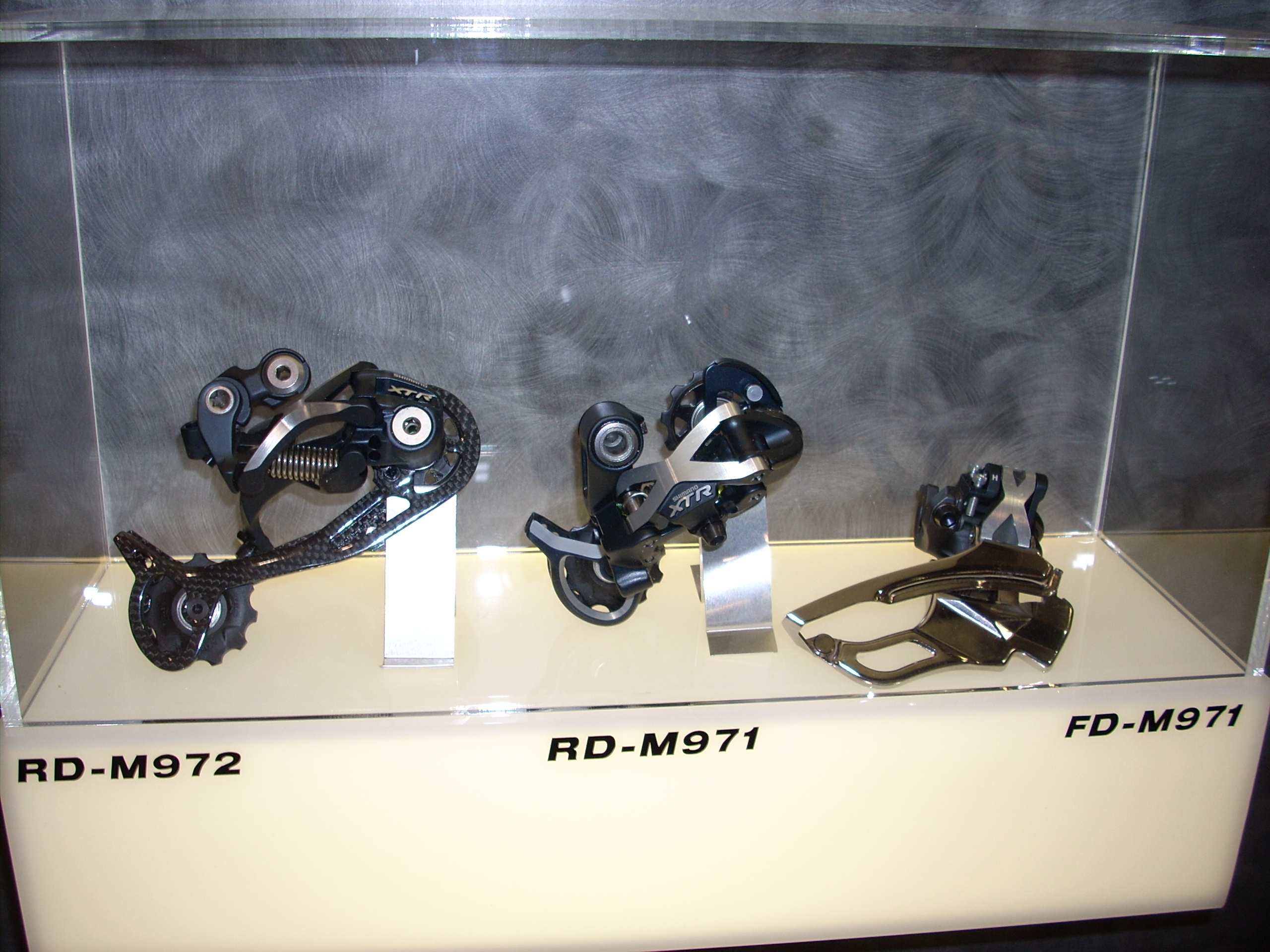 Shimano XTR 970 derailleurs